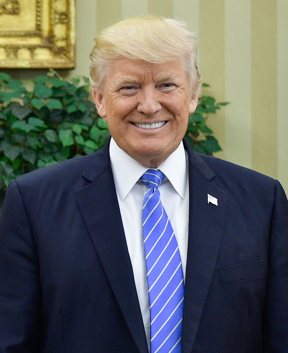 Робочий візит Президента до Сполучених Штатів Америки